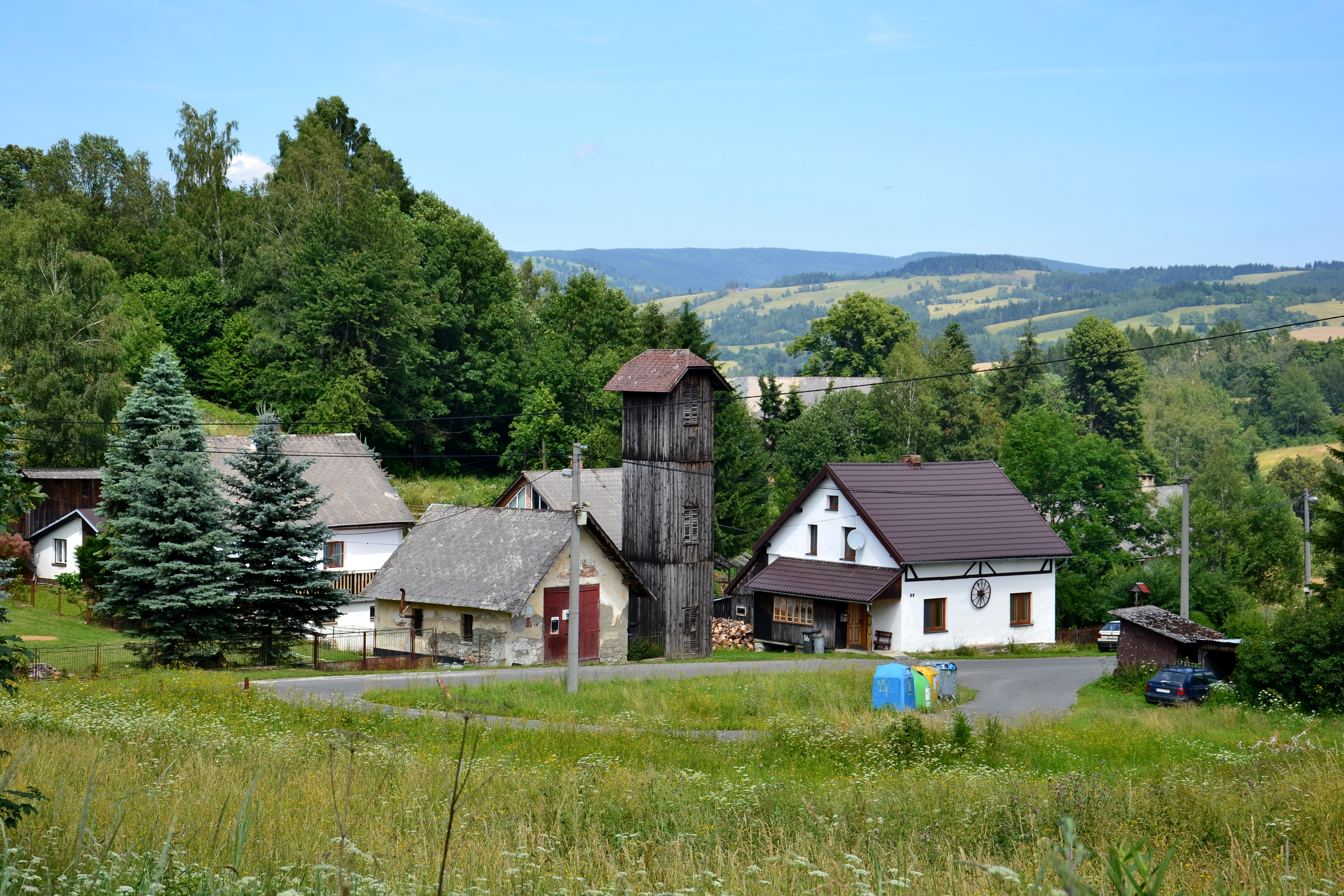 Náves